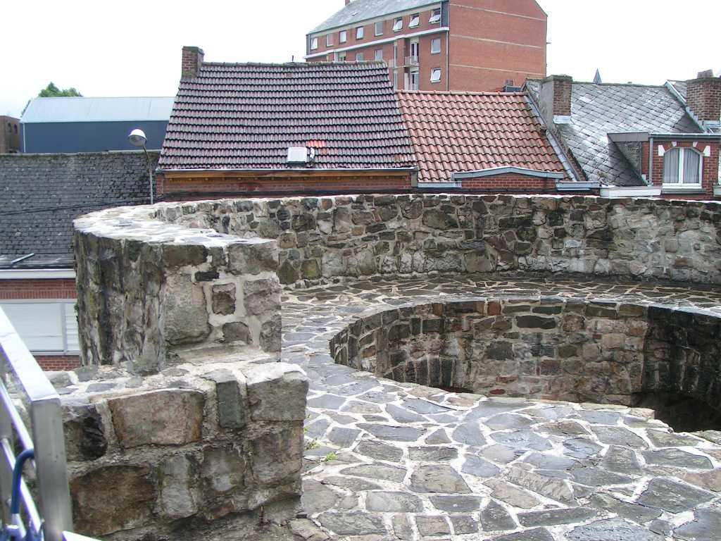 bolwerk in Binche (Henegouwen, B)